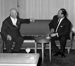 الرئيس العراقي عبد السلام عارف في المباحثات الخاصة مع الزعيم السوفيتي خروشوف أثناء التعاقد على الميغ 21